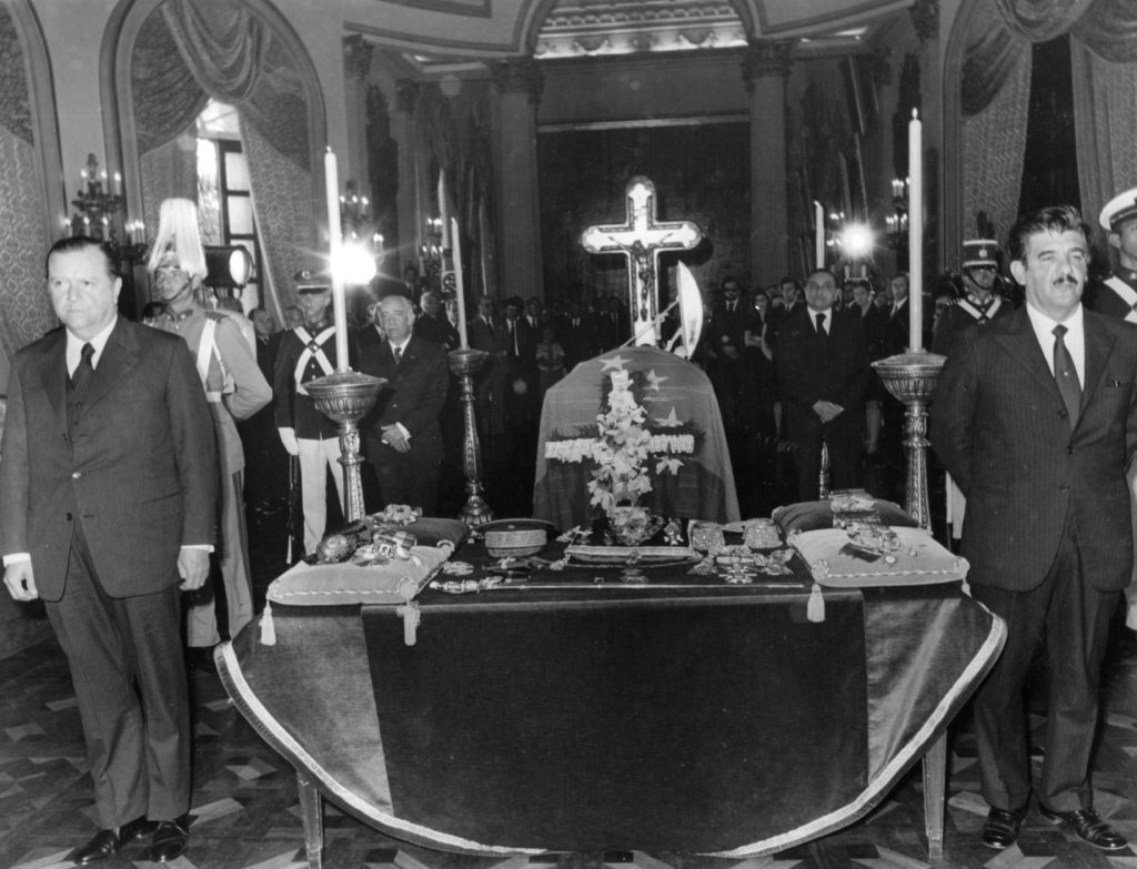 El presidente de Venezuela, Rafael Caldera, y el presidente del Congreso, José Antonio Pérez Díaz, durante el funeral del general y expresidente Eleazar López Contreras, en el Salón Elíptico del Palacio Federal Legislativo en Caracas.